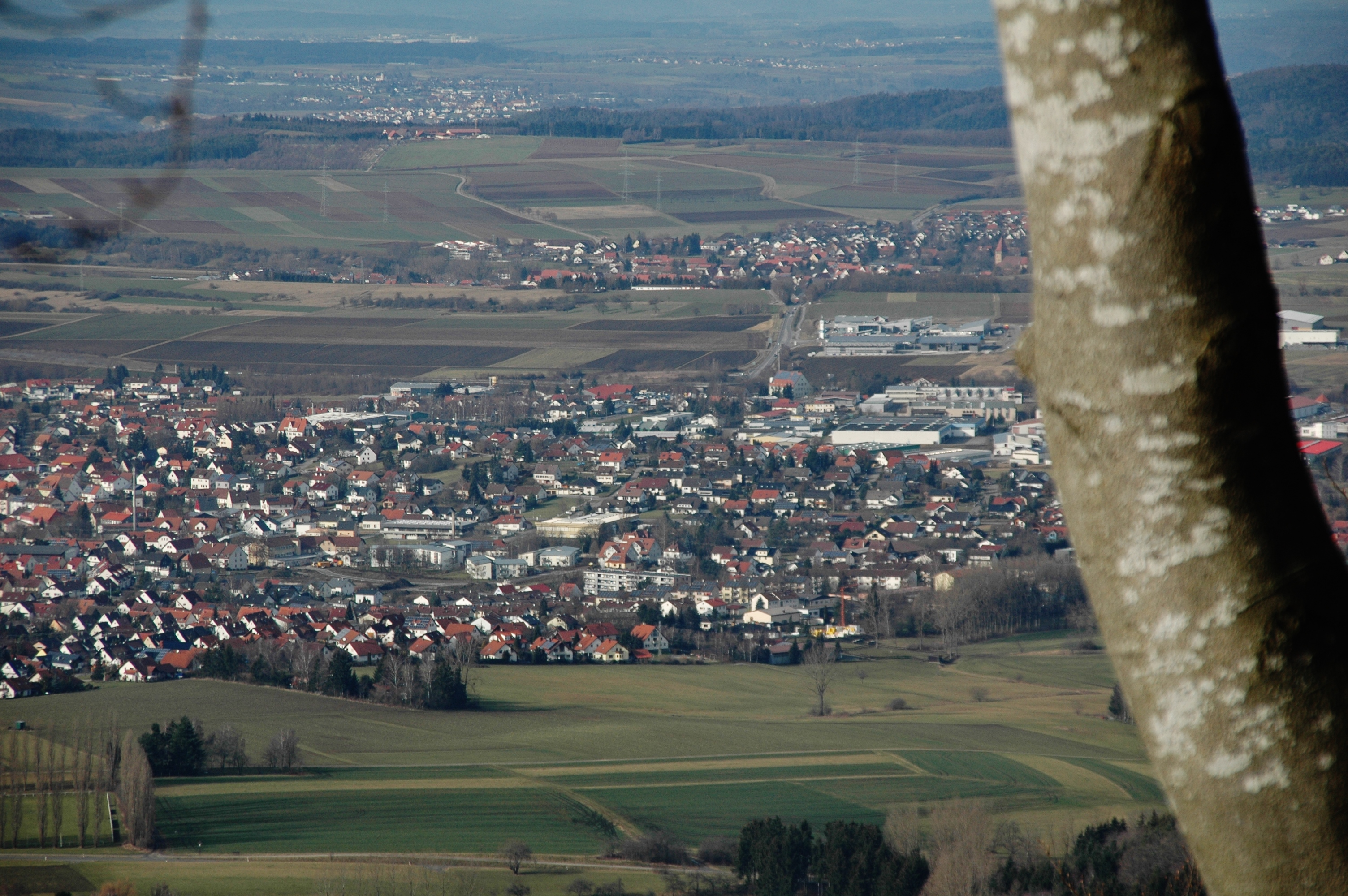 Ausblick nach Westen, Bisingen vom Traufgang